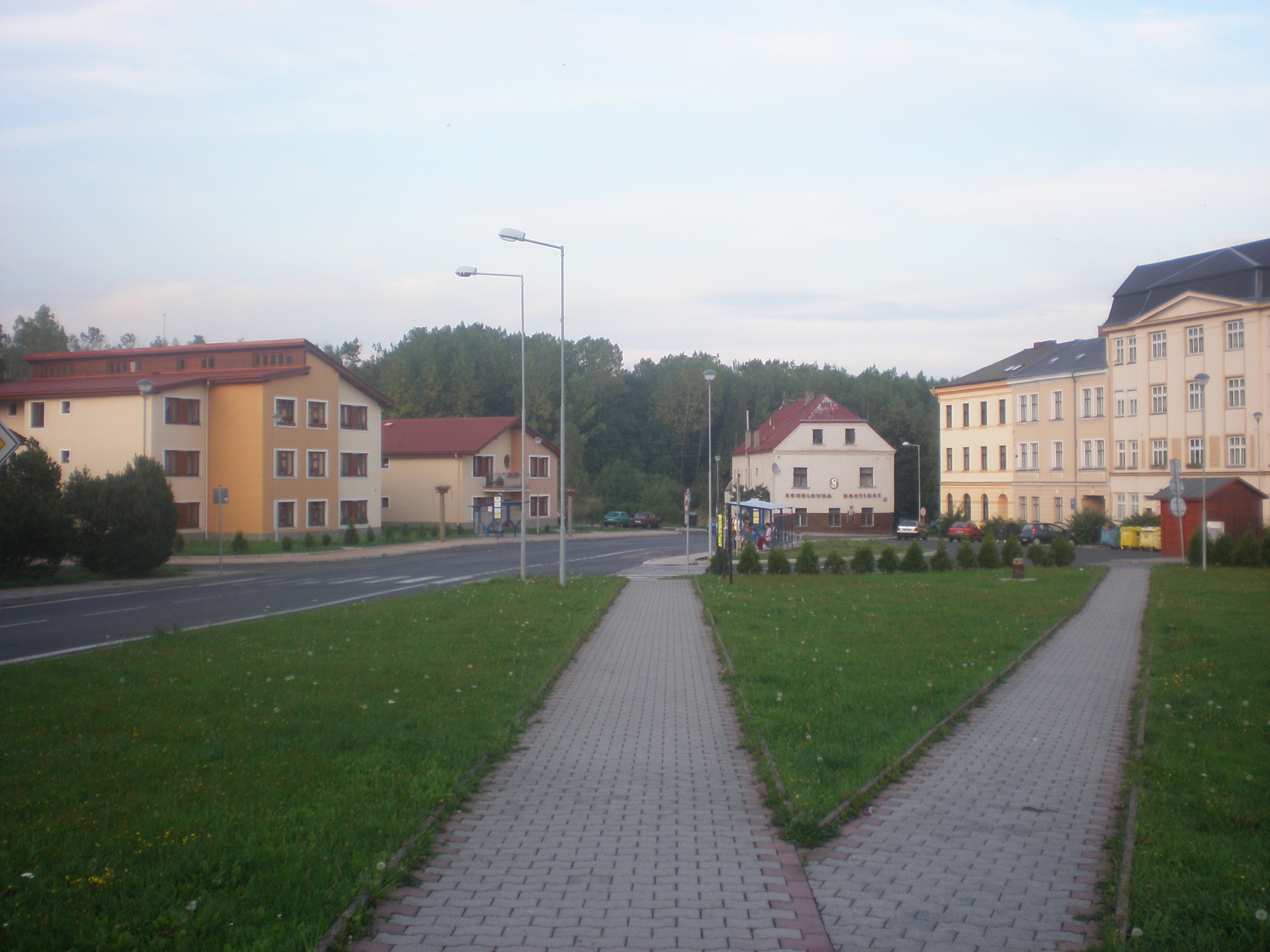 Mírové náměstí v Košťanech koncem léta 2008